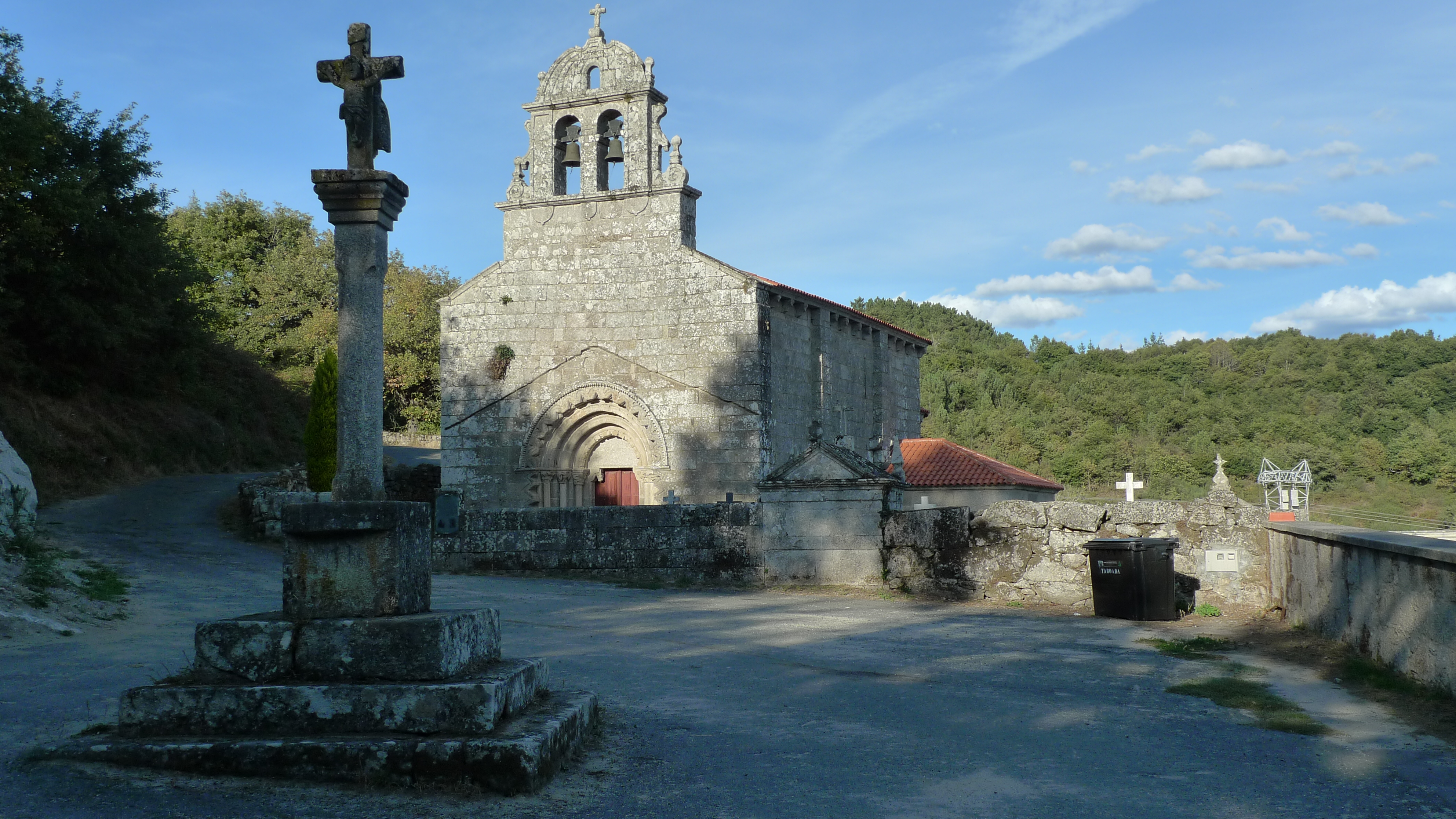 Igrexa de San Pedro de Bembibre - Taboada (Lugo)